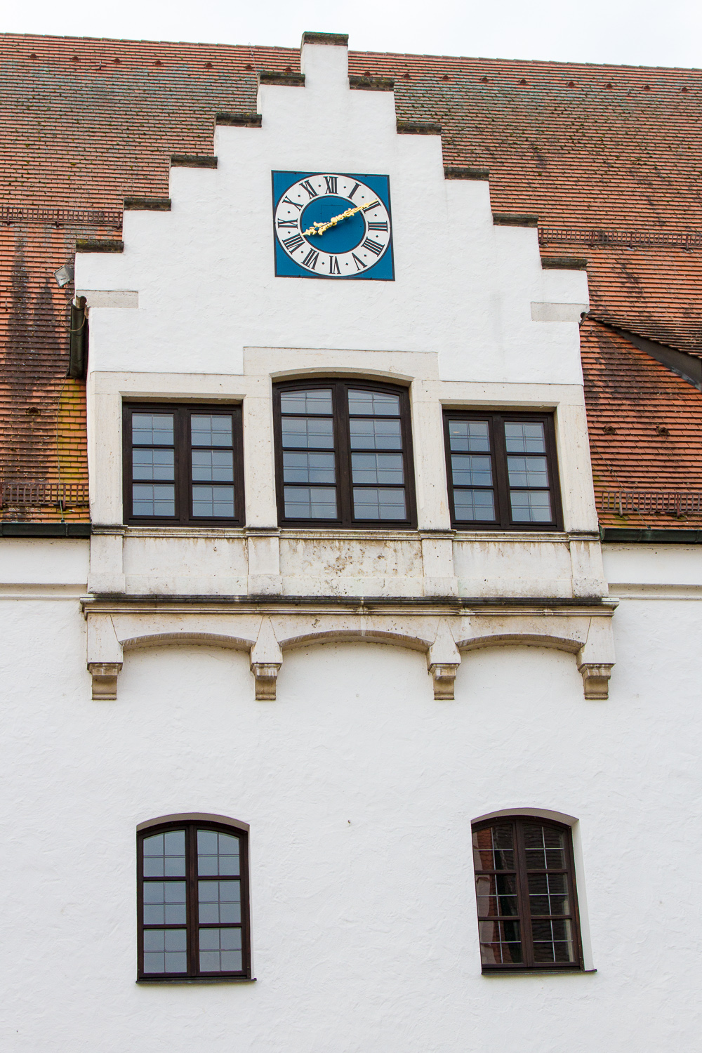 Ehemaliger Fürstbischöflicher Getreidekasten, jetzt "Haus des Gastes", freistehender zweigeschossiger Steildachbau mit Treppengiebel, Front mit Zwerchgiebel, im Kern um 1450, im 17. Jahrhundert umgebaut, im Inneren entkernt 1975.This is a photograph of an architectural monument.